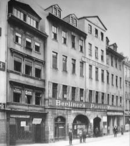 Die Vorgängerbauten des Zeppelinhauses Leipzig, Nikolaistraße 27, 29, vor dem Abriss